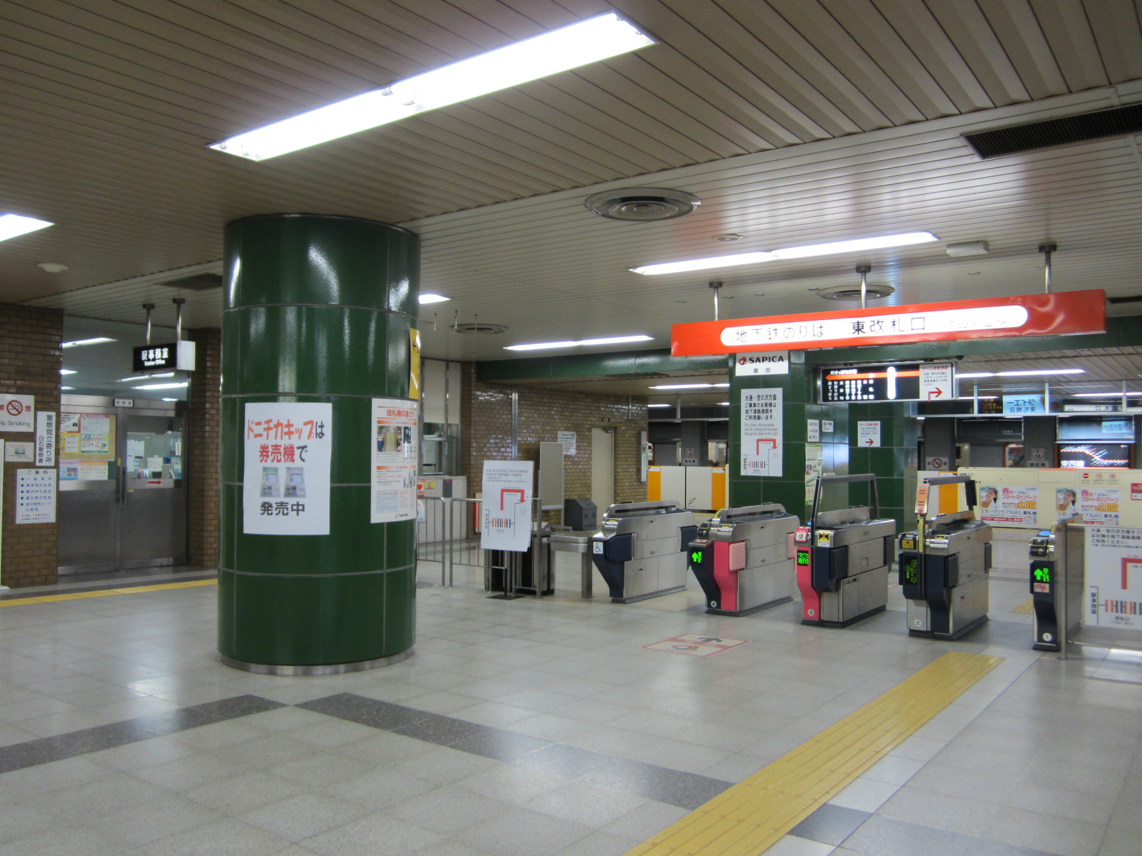 1番出入口（階段経由）からの改札口・事務室の様子。そのまま1番ホーム（大谷地・新札幌方面）に直結する